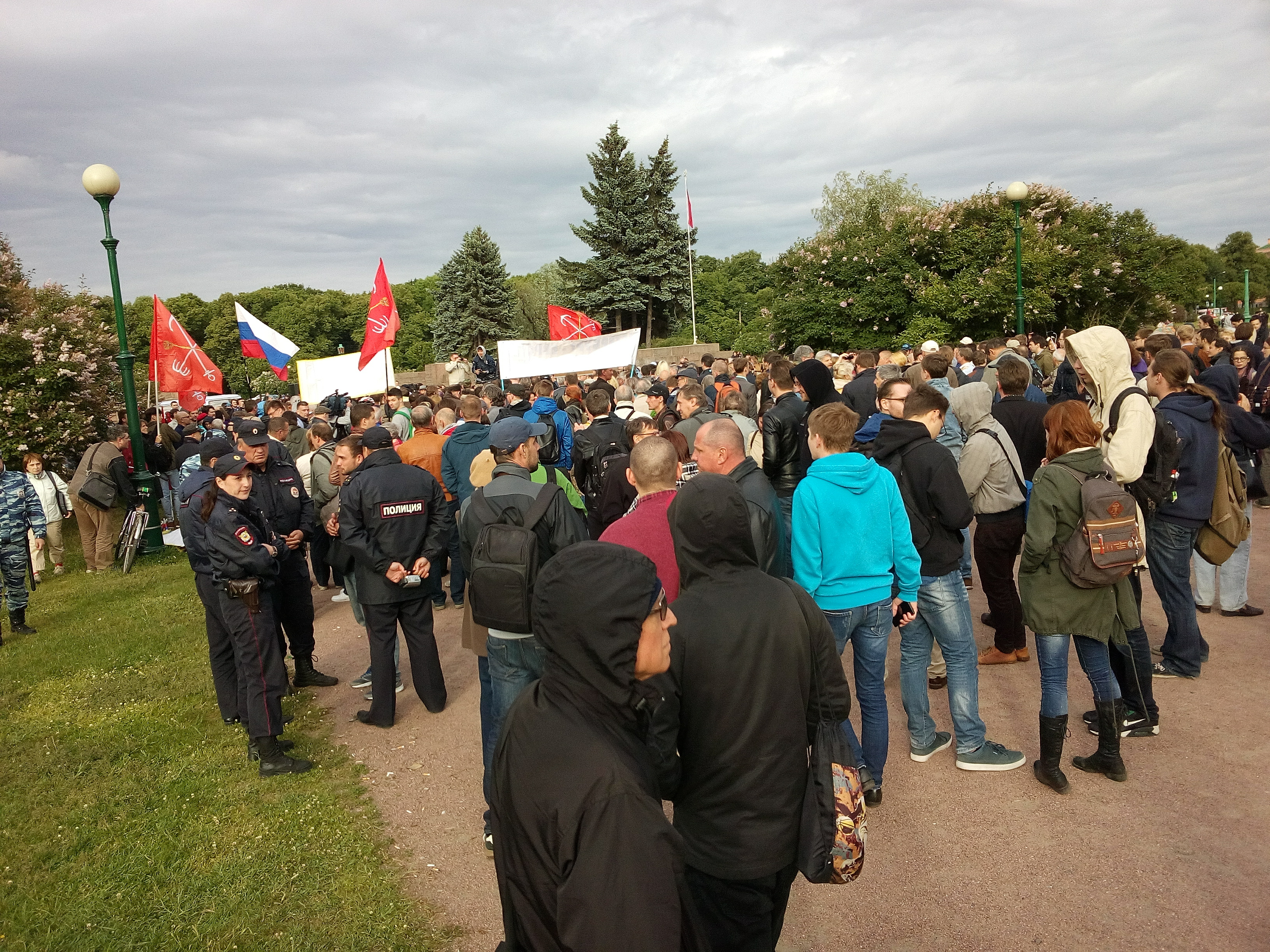 Начало митинга, прошедшего 6 июня на Марсовом поле, против наименования моста в створе проспекта Героев в Санкт-Петербурге в честь Ахмата Кадырова.